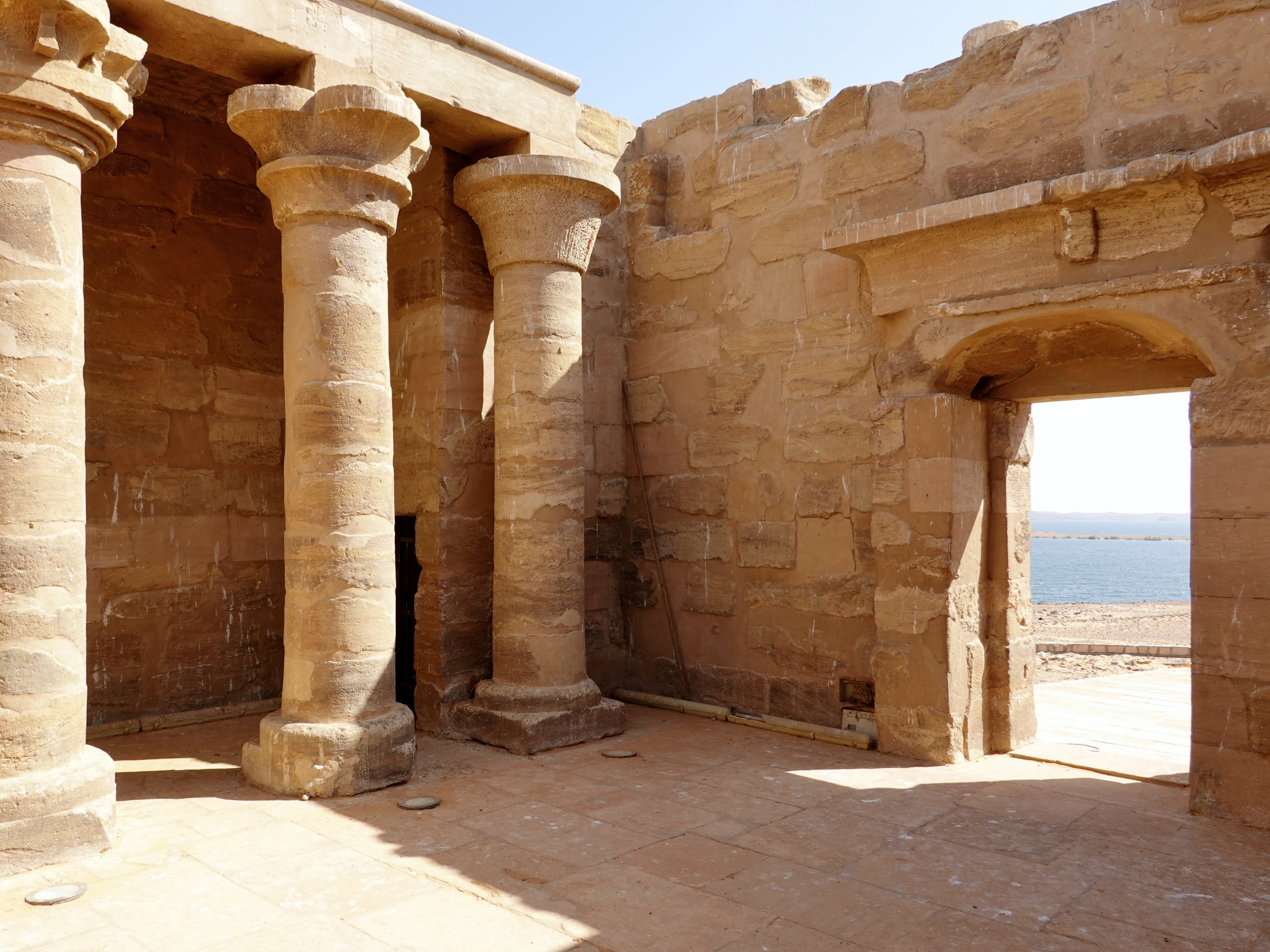 Innenraum des Tempels von Maharraka am Nassersee, Ägypten